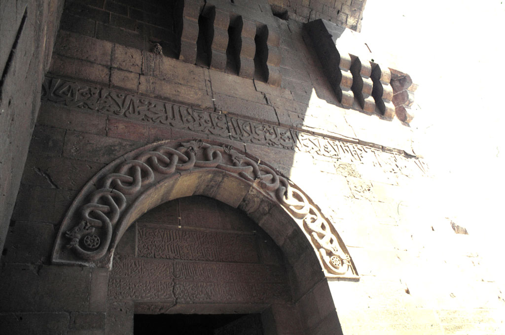 Décor de deux serpents alacés au-dessus de la porte de la citadelle d"Alep Photo personnelle (1980) Michel Benoist